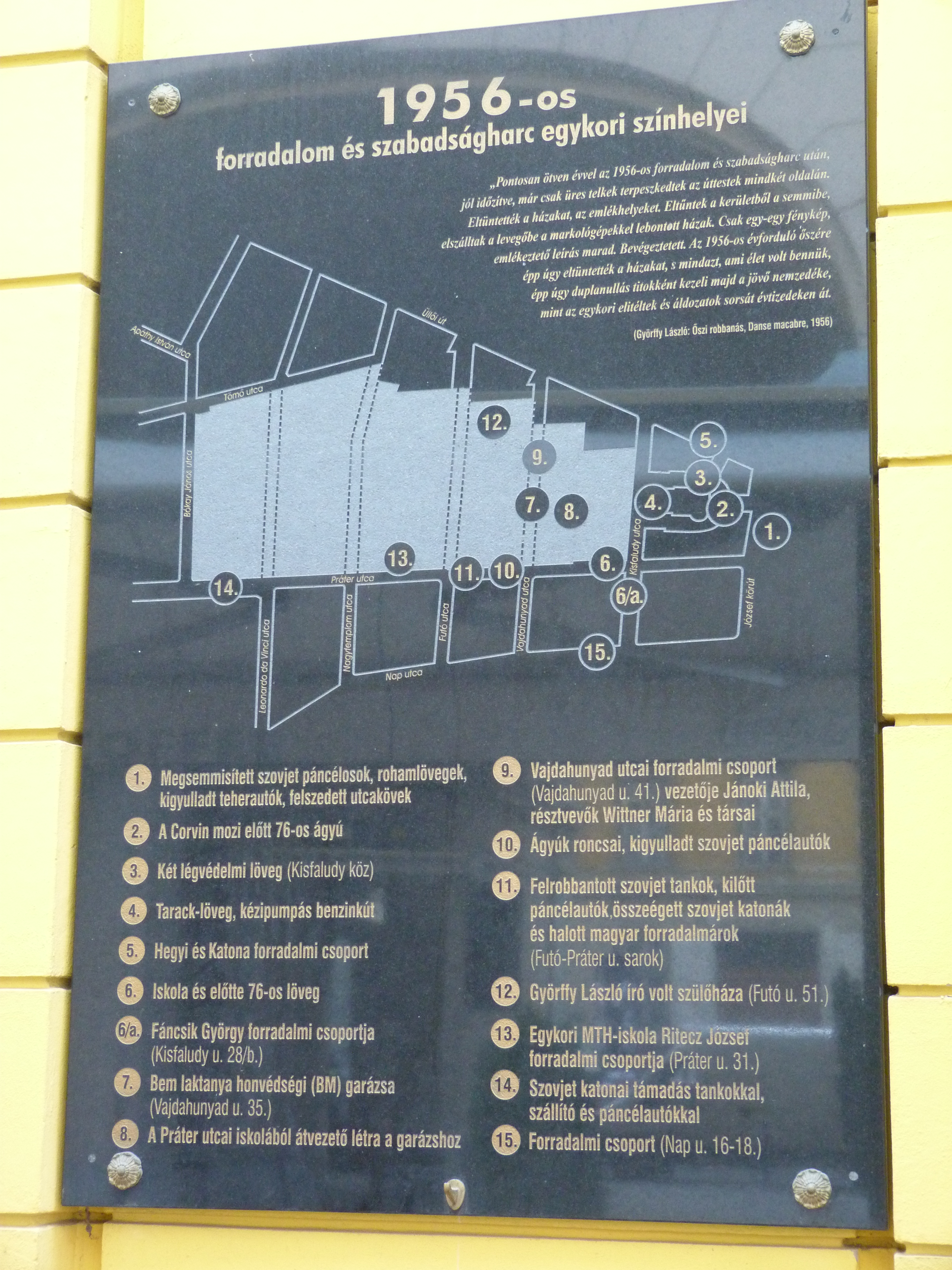 A felvétel 2012. december 5 -én készült Budapesten, a Józsefvárosban. Corvin köz. ©© Published under Creative Commons in the Metapolisz DVD line. All of the photos and vids in the Metapolisz DVD line are under Creative Commons and can be used even for commercial – for profit – purposes. Recommended Citation Derzsi Elekes Andor: Metapolisz DVD line ©© Megjelent Creative Commons alatt a Metapolisz sorozatban. A Metapolisz sorozat valamennyi képe és filmje Creative Commons alatti valamint kereskedelmi - for profit - célra is felhasználható. Ajánlott hivatkozás: Derzsi Elekes Andor: Metapolisz DVD line Másik fénykép ugyanerről a tábláról: File:Budapest-corvin-szinhelyei.jpg